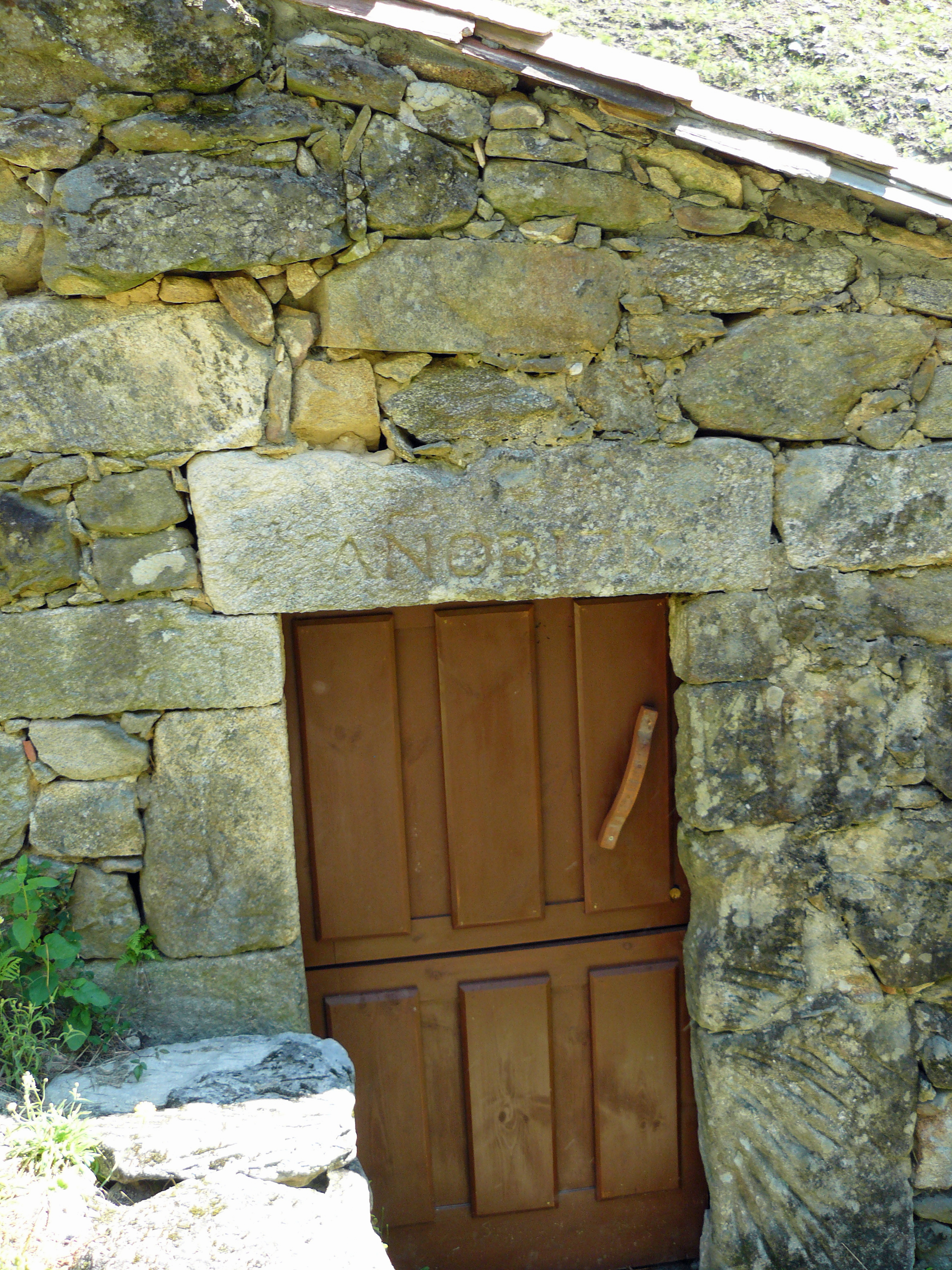 Inscrición1715muíñoFolón